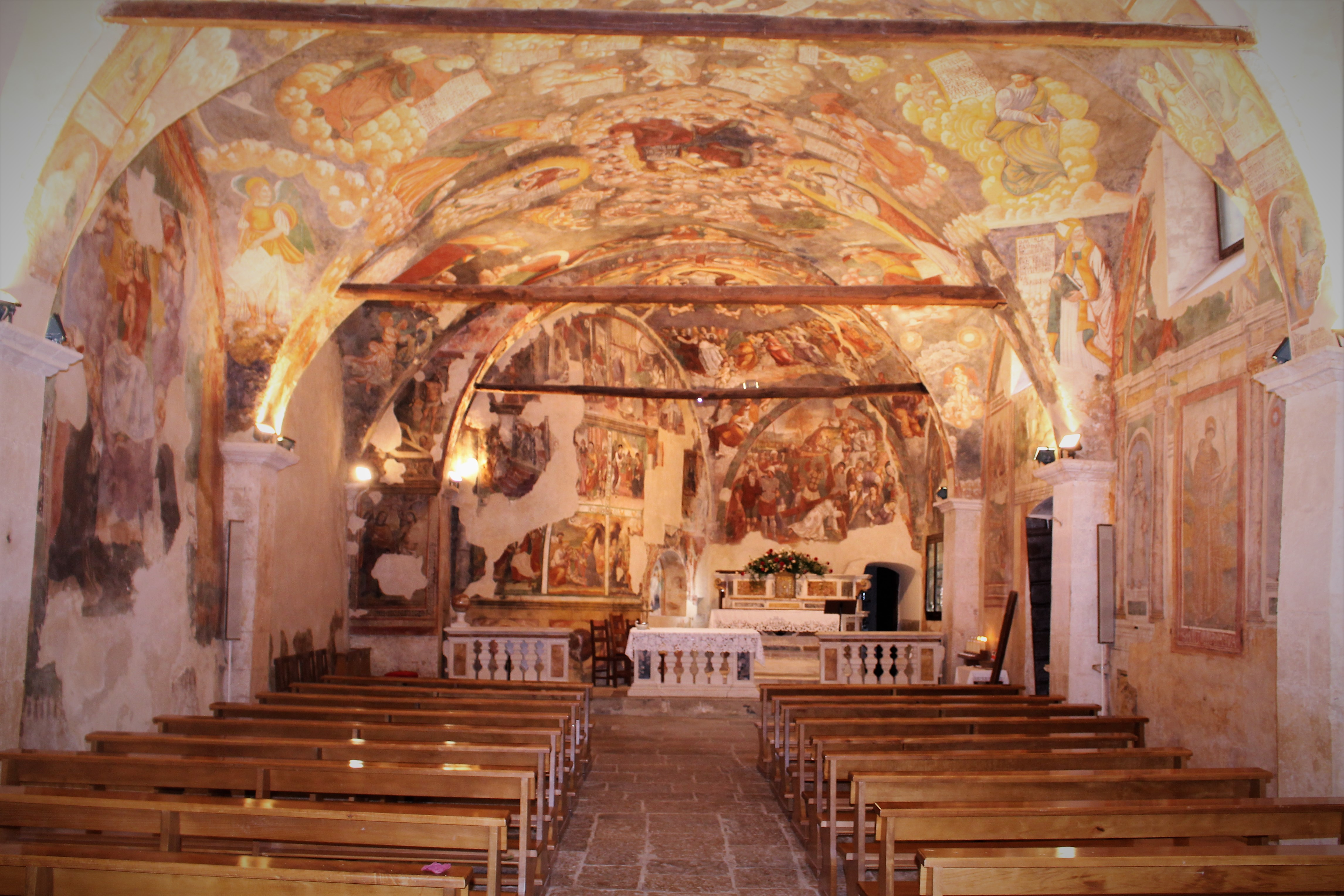 Interno del santuario della Madonna d'Appari